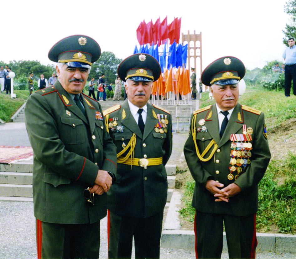 Գեներալ-մայոր Ա.Թ. Հարությունյան, գեներալ-մայոր Ս.Վ. Միրզոյան և գեներալ-գնդապետ Գ.Հ. Դալիբալթայան: Մայիսի 28, Սարդարապատ